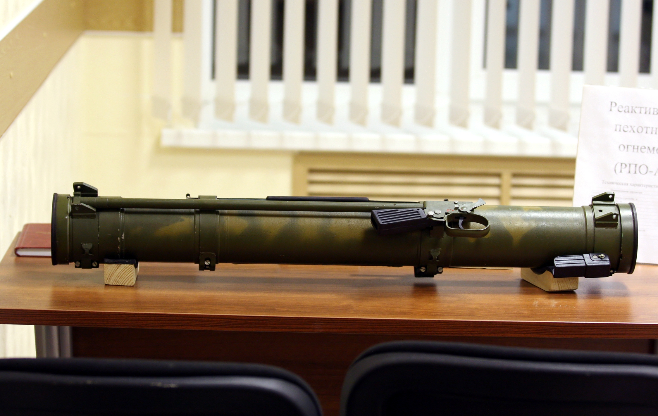 Реактивный пехотный огнемет РПО-А (RPO-A)